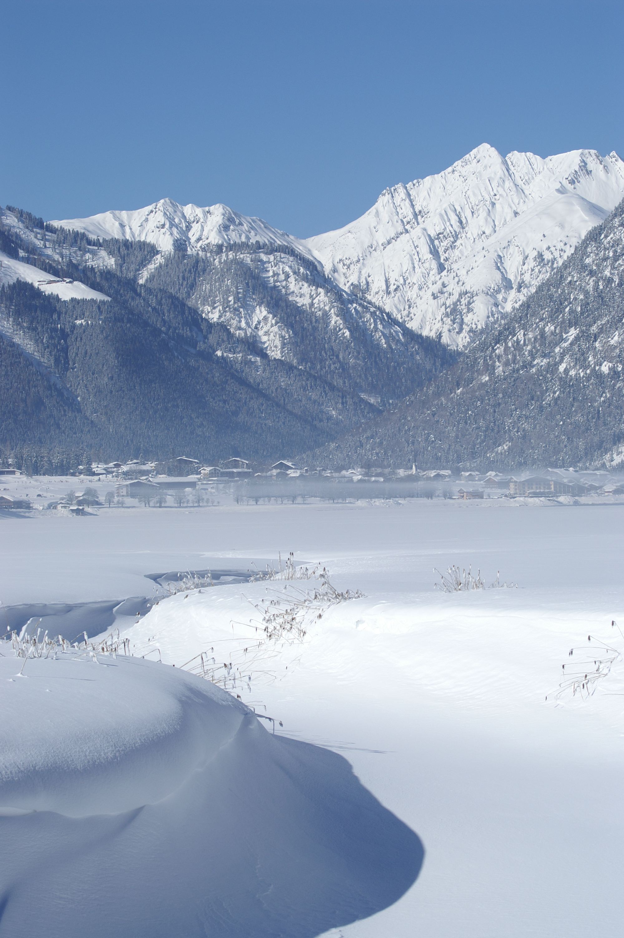 Winter in Pertisau am Achensee in Tirol.